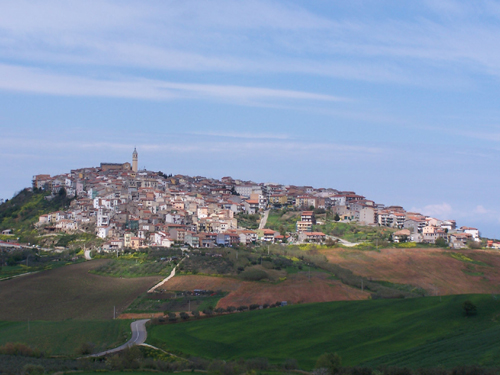 Montenero di Bisaccia, panorama Author: myself Butred77